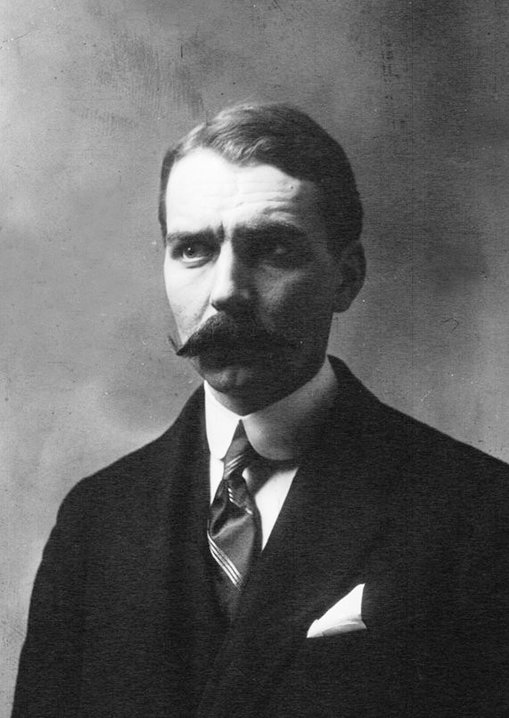 Mr Bréguet, aviateur